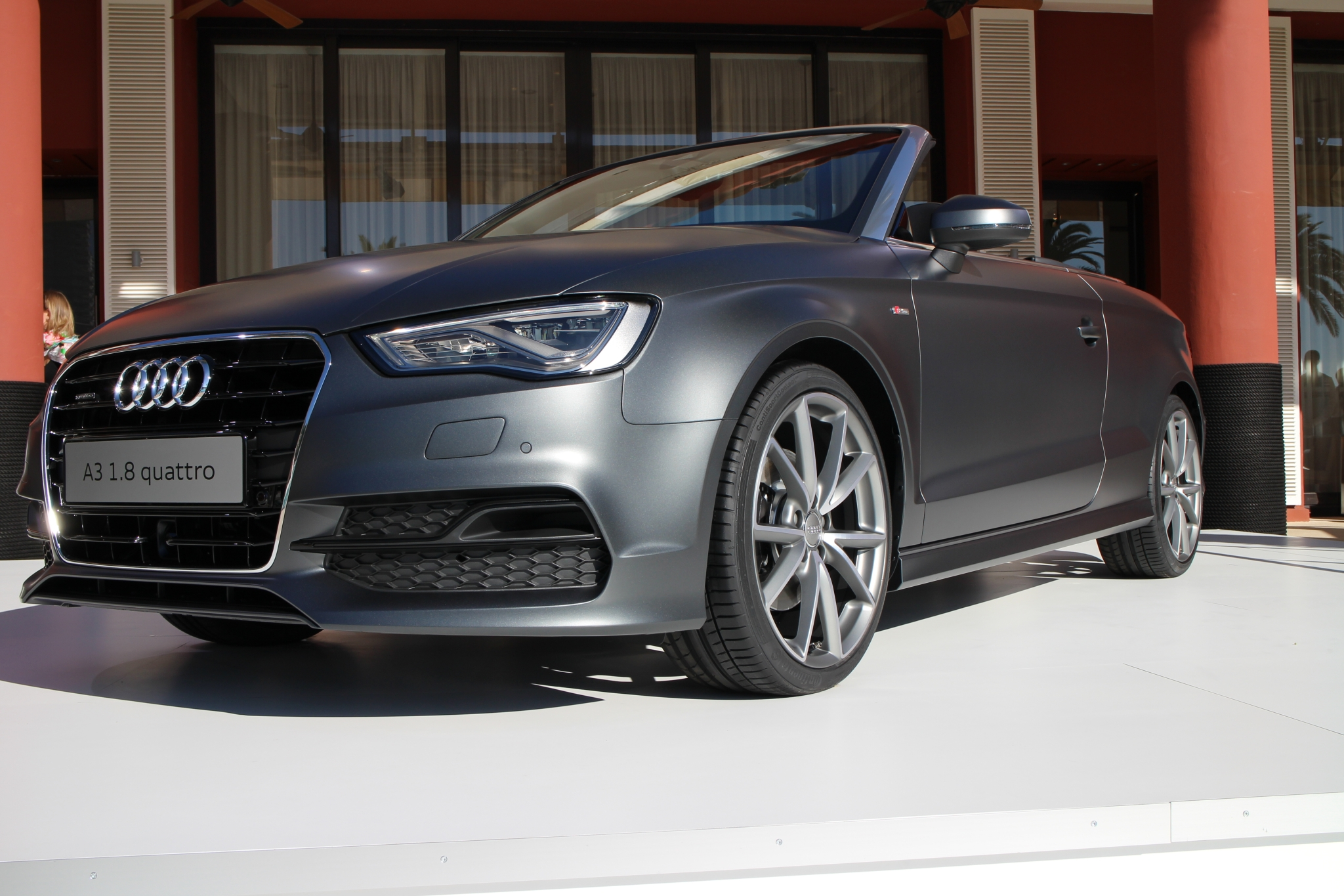 Audi A3 Cabrio 2013